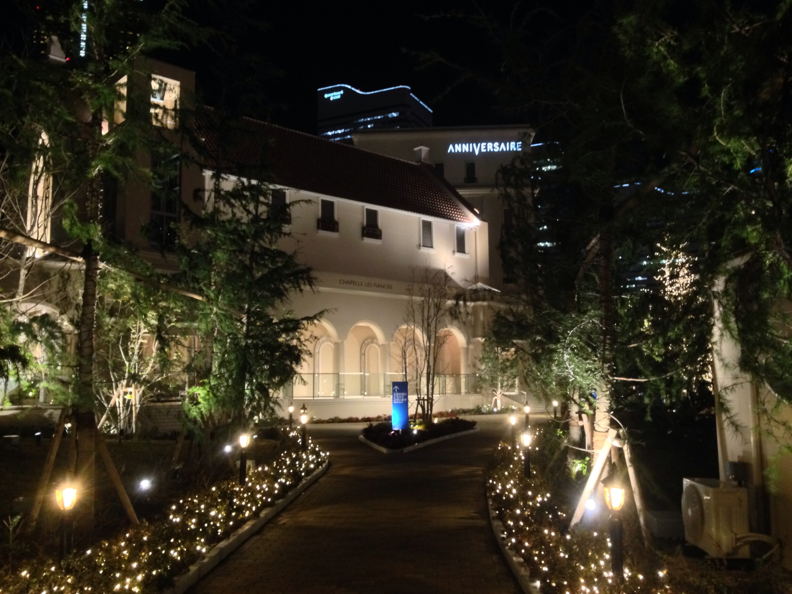 アニヴェルセル みなとみらい横浜の外観。